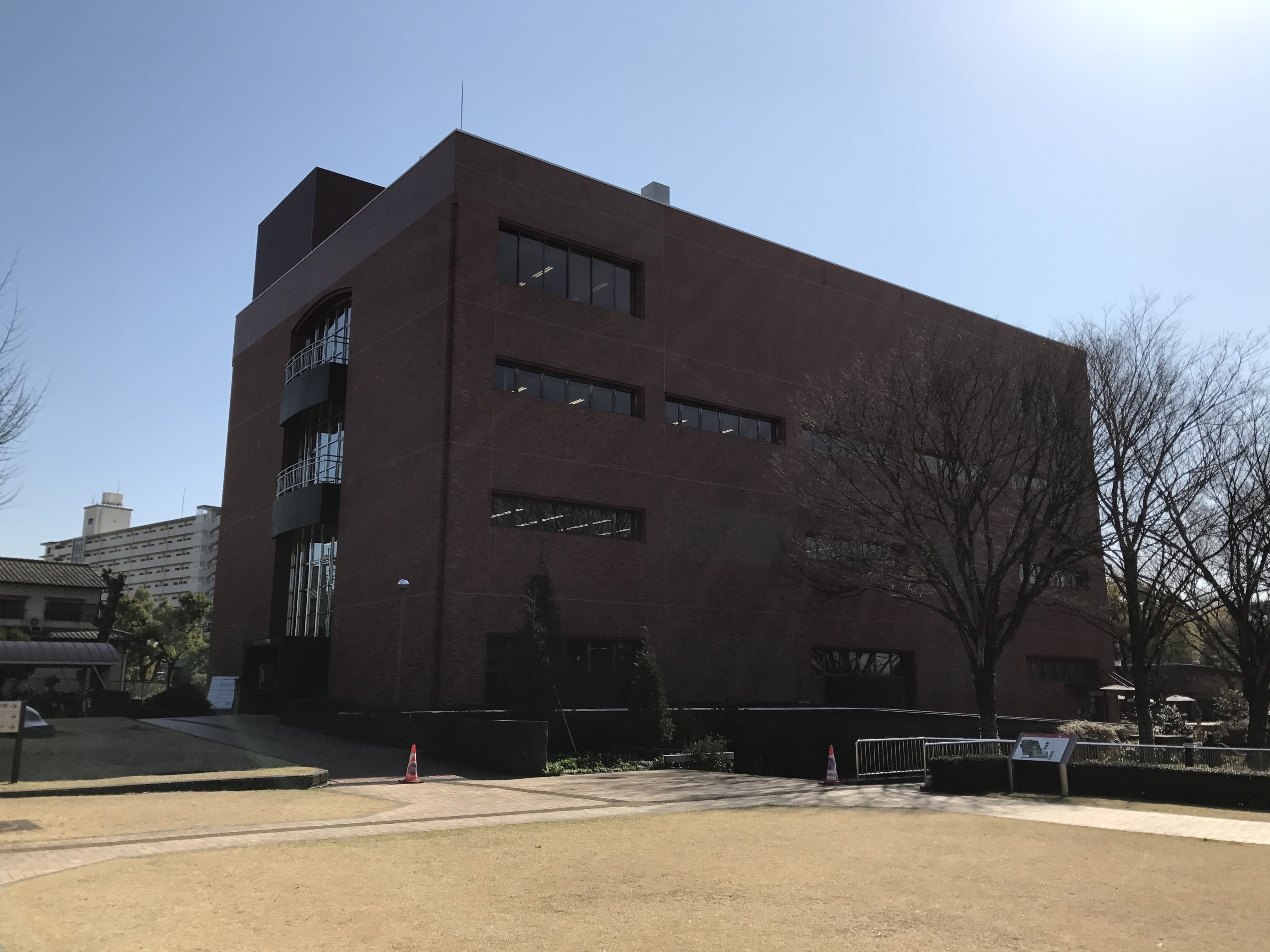 久留米市立中央図書館